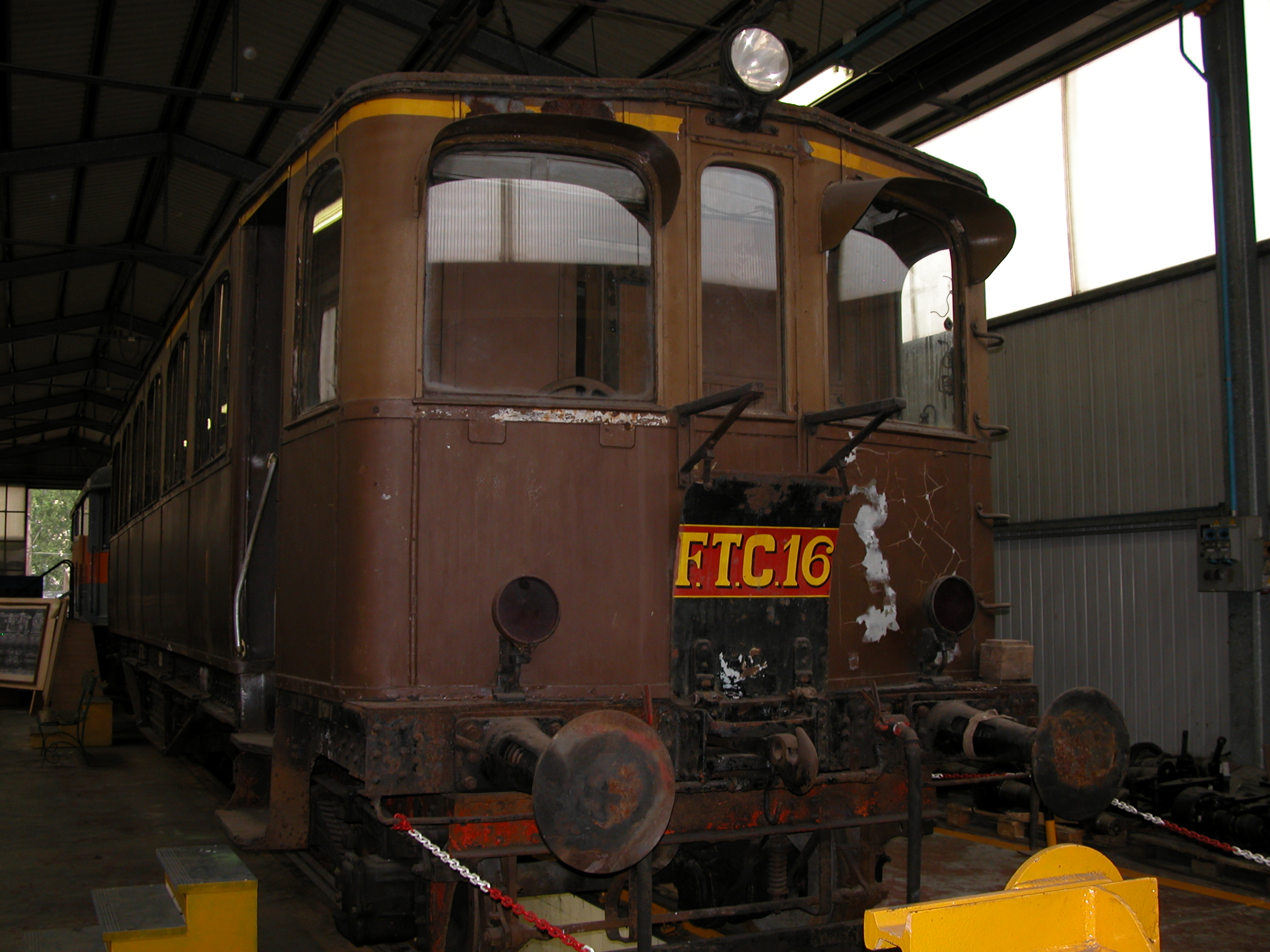 Automotrice elettrica FTC 16 in corso di restauro (cabina anteriore).